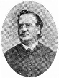 Karel Findinský (1833 - 1897), Český římskokatolický kněz a historik.